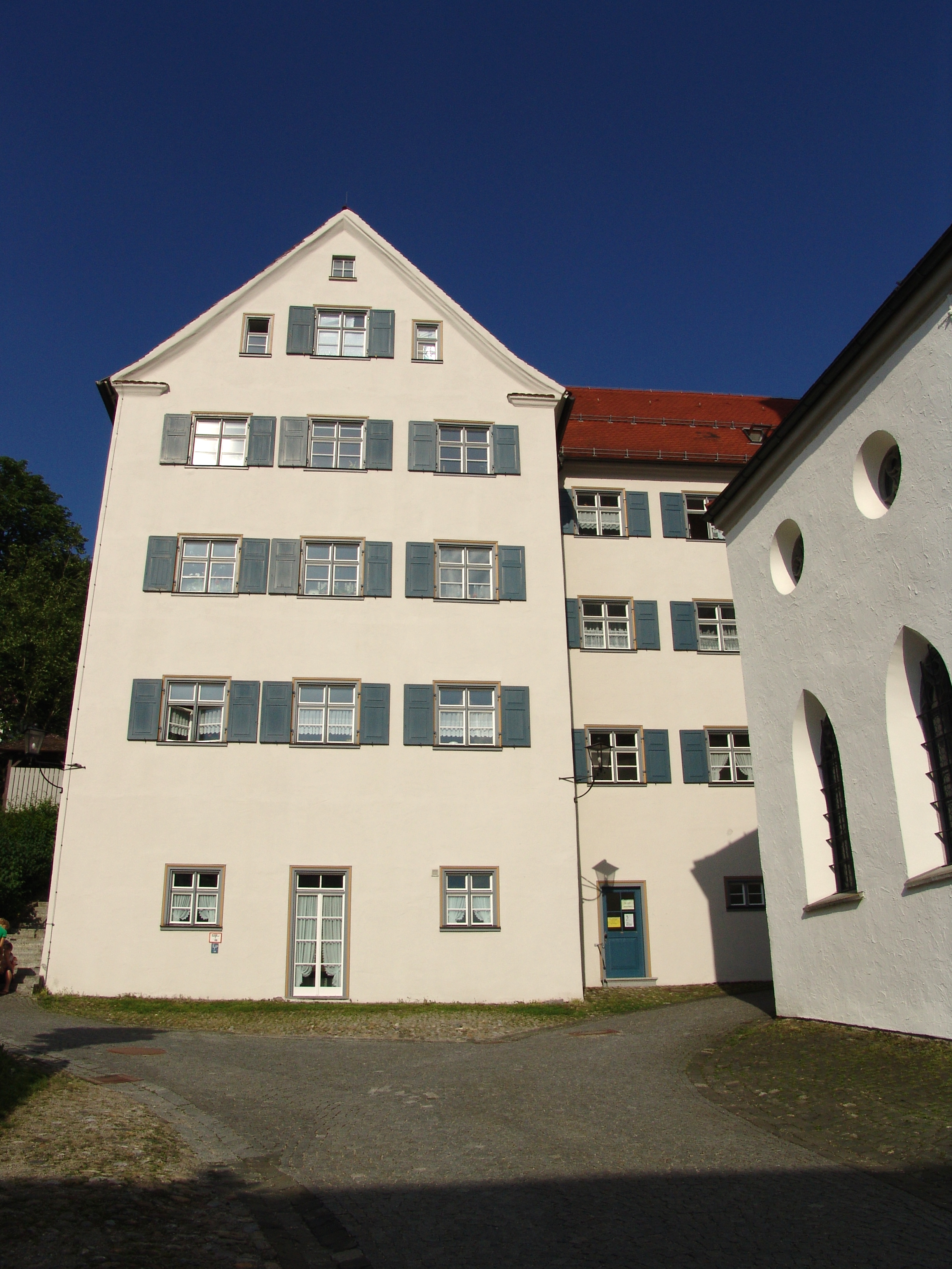 Leutkirch, ehemaliges Kloster